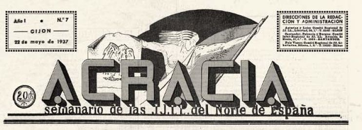 Le 26 décembre 1936, à Gijón (Asturies), sortie du premier numéro de l'hebdomadaire Acracia, « Organe Régional des Jeunesses libertaires des Asturies, du Leon et Palencia ». Quinze numéro sortent jusqu'au 3 avril 1937. Mais le journal se poursuit ensuite en reprenant la numérotation à zéro à partir du 10 avril 1937 et en changeant seulement le sous-titre du journal qui devient l'hebdomadaire des « Jeunesses Libertaires du Nord de l'Espagne » jusqu'au 15 octobre 1937.